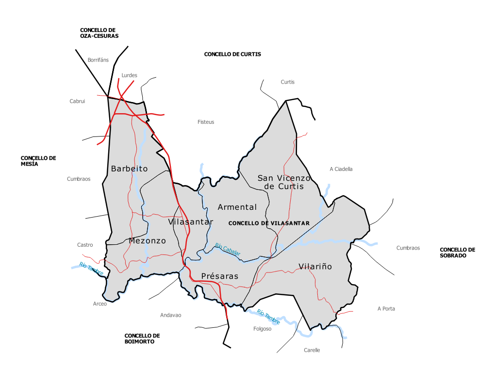 Mapa de parroquias do concello de Vilasantar.